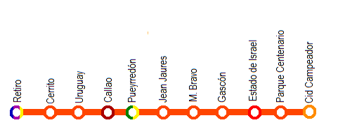 Progetto Linea G